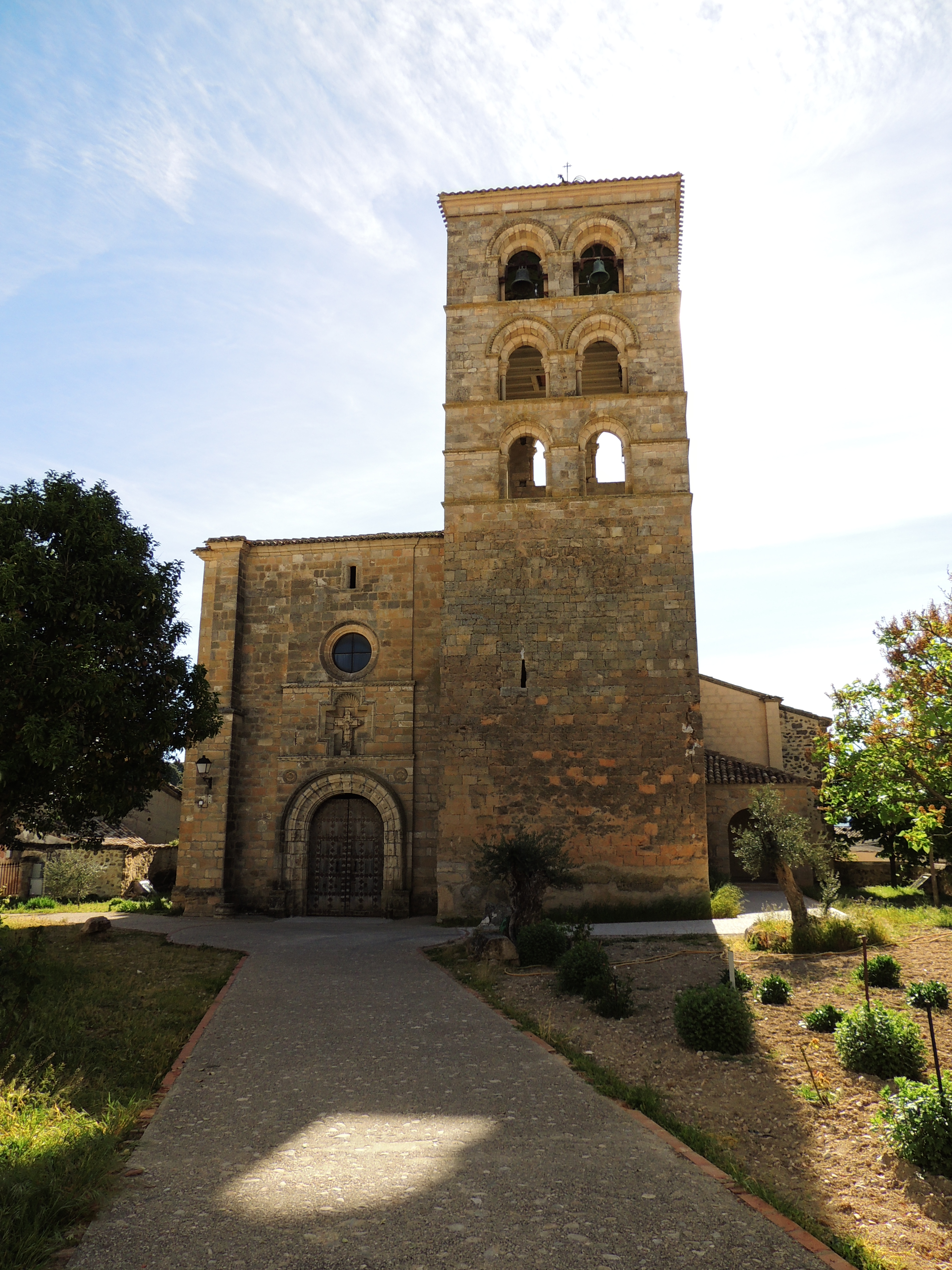 Iglesia de la Asunción de Valdeolivas